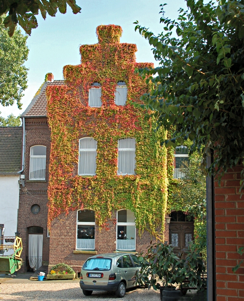 Der Henshof in Rommerskirchen-Evinghoven